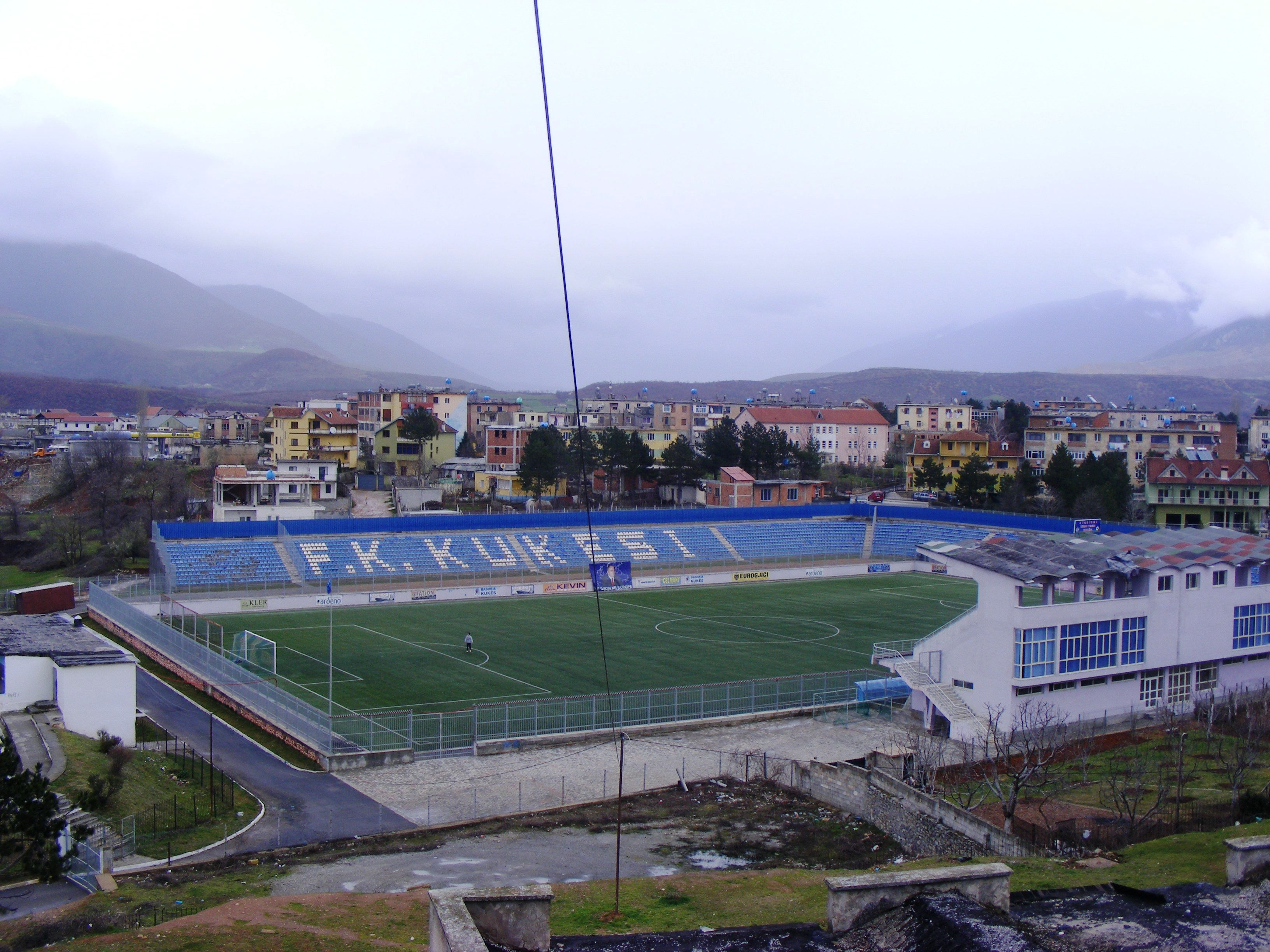 Stadimi i Klubit të Futbollit " Kukësi", Kukës, Shqipëri